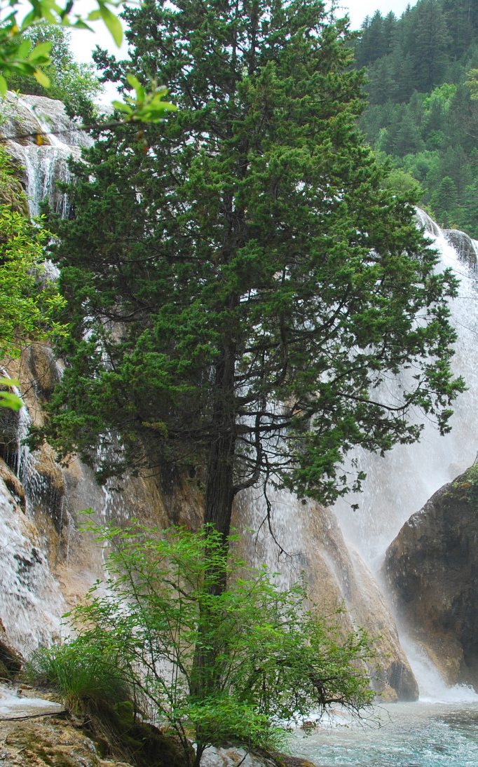 Sichuan Juniper Juniperus saltuaria, Jiuzhaigou, Aba, Sichuan, China